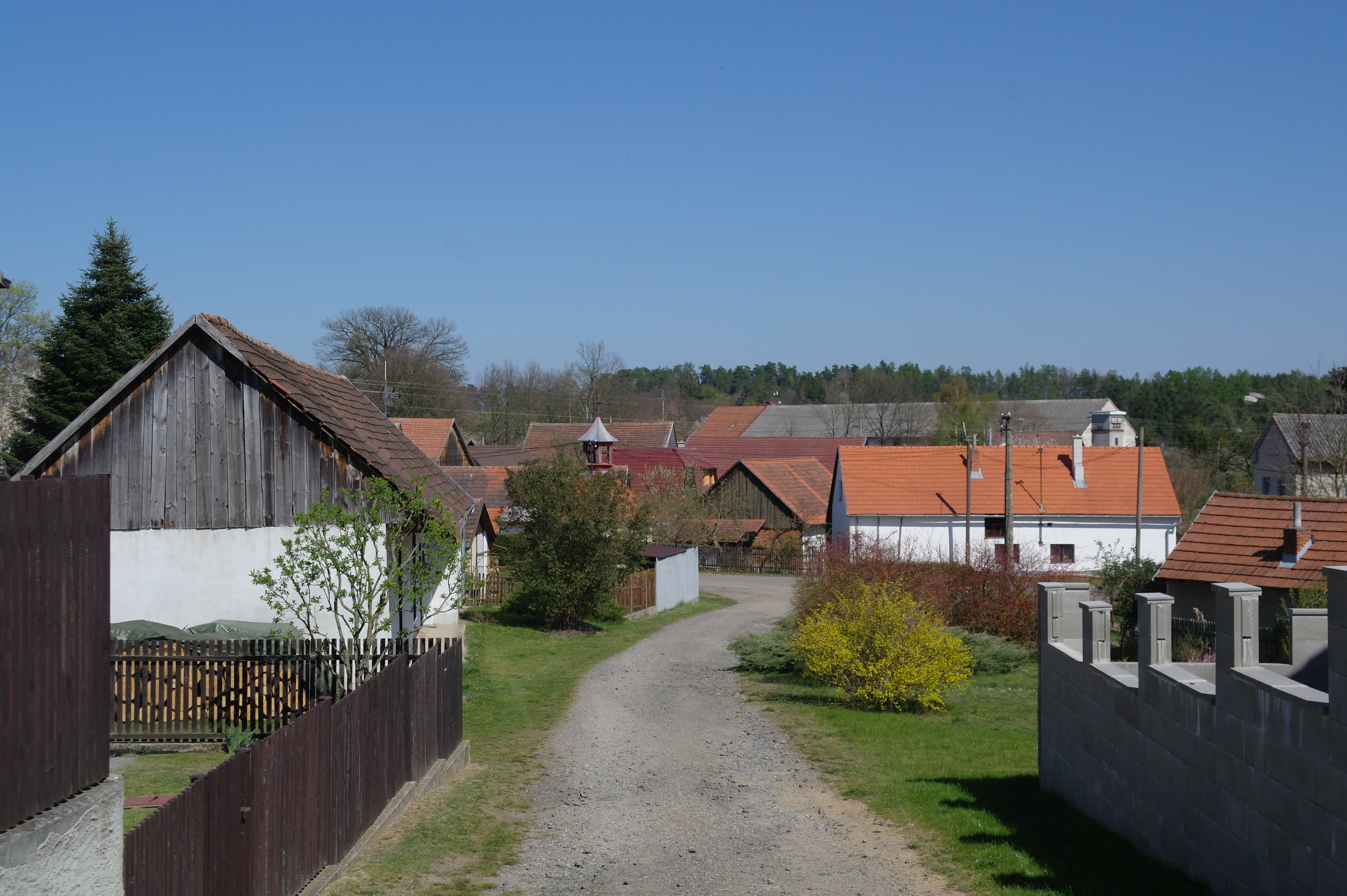 Hrazená Lhota. Česká republika.